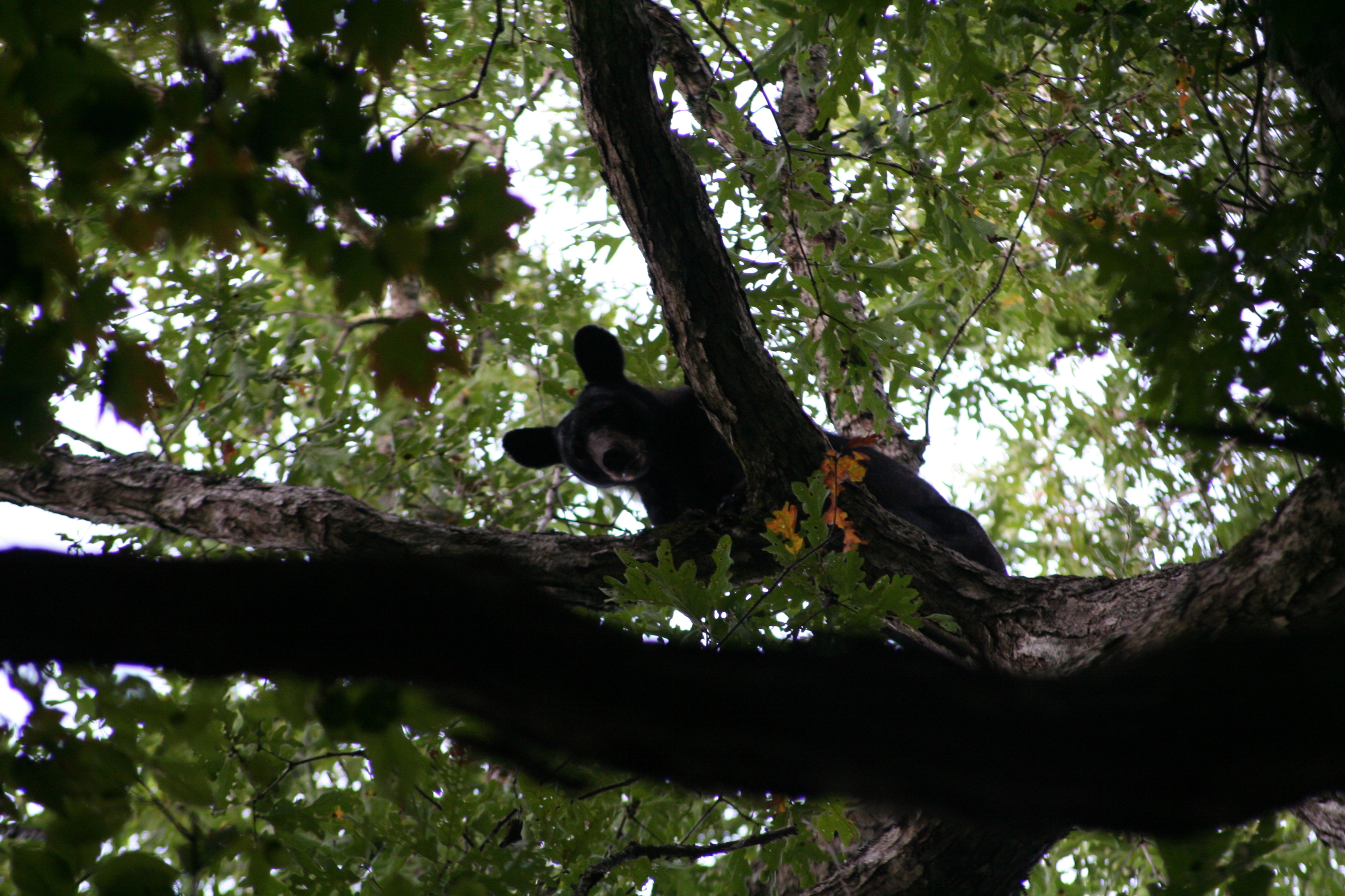 Amerikanischer Schwarzbär auf einer Eiche in den Smokey Mountains, Tennessee, etwa in 10 Metern Höhe. Im Herbst fressen sich die Bären mit Eicheln voll, um sich für den Winter fit zu machen. Seine Größe entspricht etwa einer großen Dogge, wobei er etwa doppelt so voluminös ist. Das hat ihn jedoch nicht daran gehindert, plötzlich erstaunlich flink mit dem Abstieg zu beginnen - in wenigen Sekunden war er am Boden, und mein Begleiter und ich sind selten so schnell um unser Leben gerannt :-) Der Bär trollte sich dann aber in die andere Richtung, und wie uns (leider erst danach) ein Ranger erzählte, sind die Schwarzbären sehr friedlich - wenn sie nicht gerade Junge haben. Menschen werden so gut wie nie angegriffen.